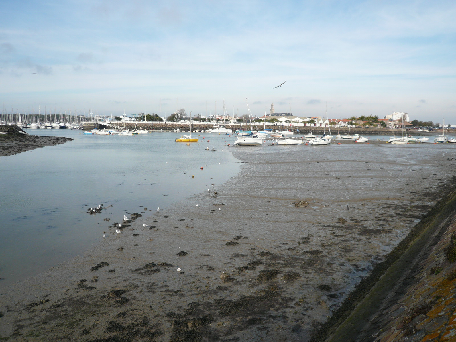 Saint-Gilles-Croix-de-Vie dans le département de la Vendée (France) : Le port de plaisance et l'église Sainte-Croix vue à marée baisse depuis l'embouchure du Jaunay dans le fleuve de la Vie côté Saint-Gilles en octobre 2008.